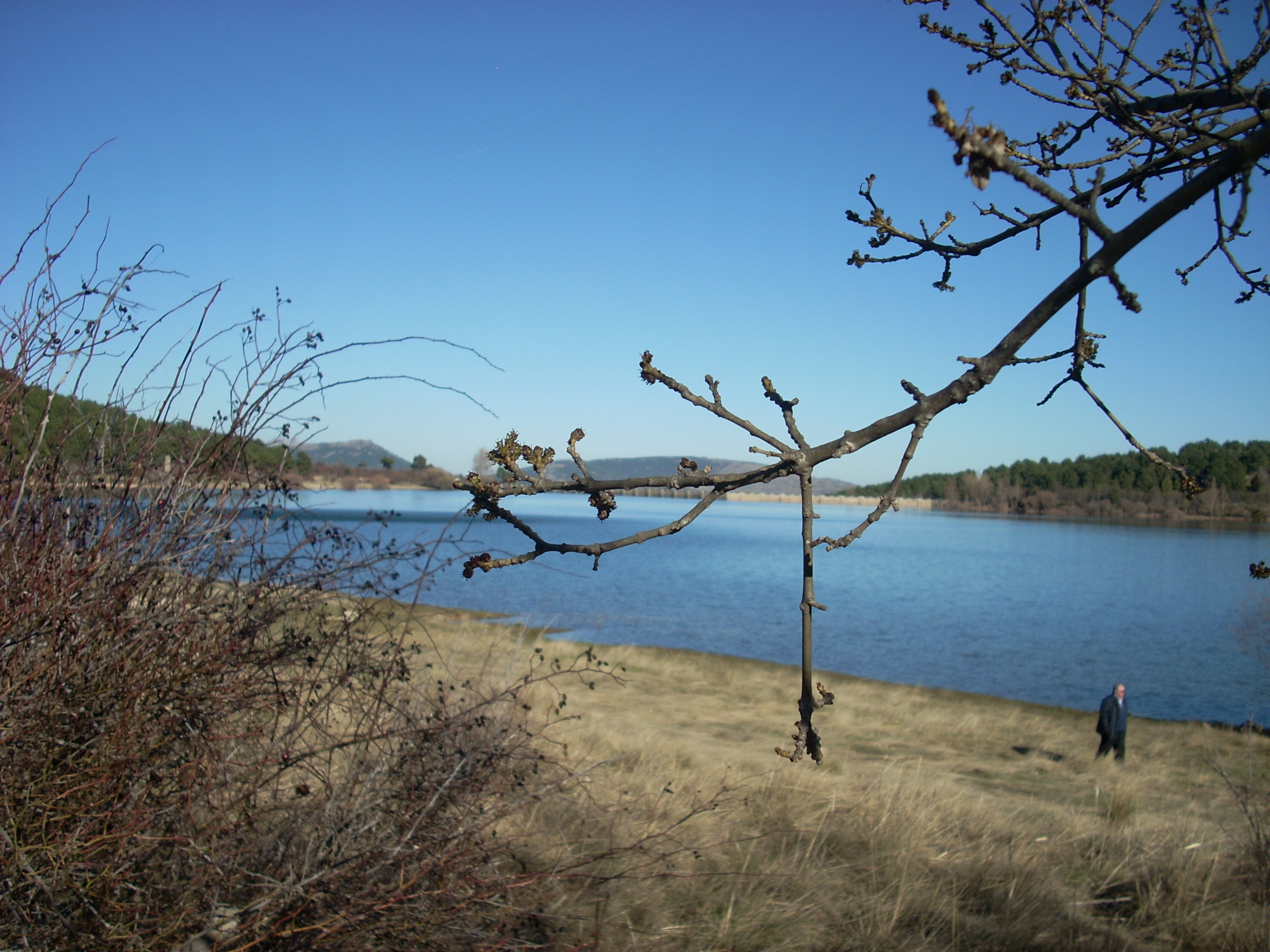 Embalse de La Jarosa, Guadarrama, Madrid, España